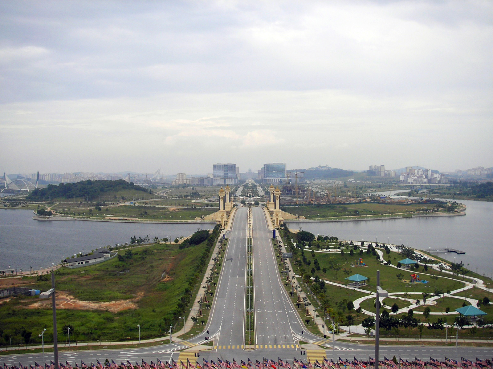 Image of Putrajaya